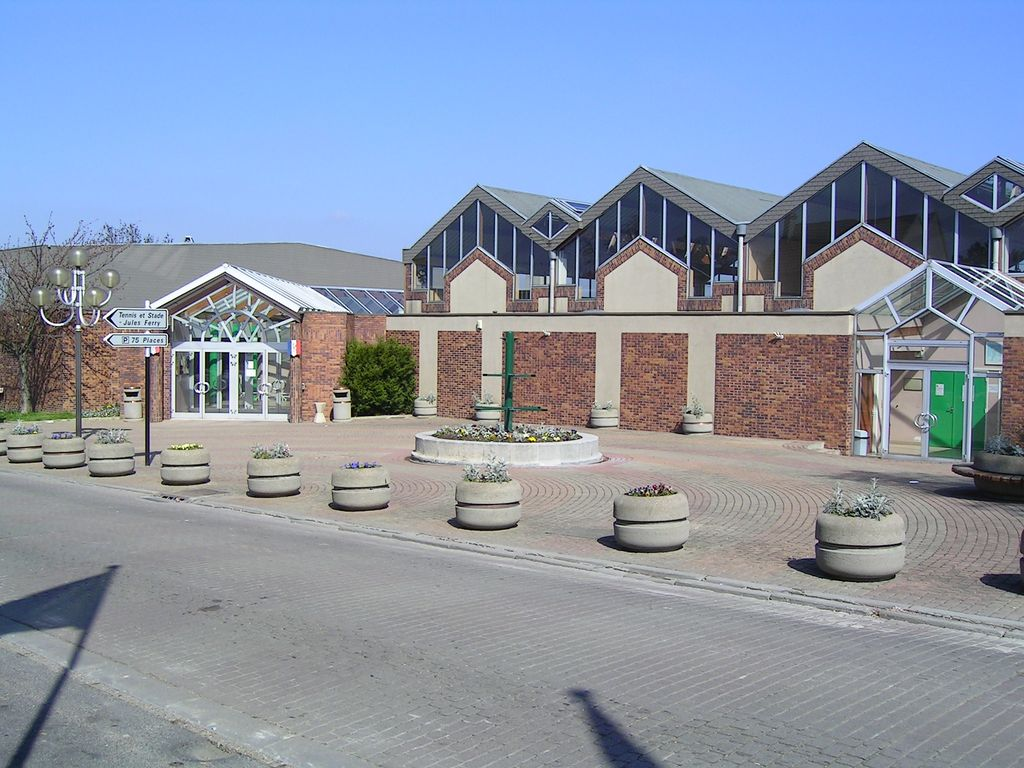 Complexe sportif, accollé au groupe scolaire Fenelon, rue Alexandre Boucher